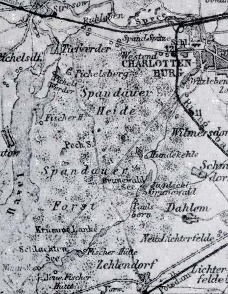 Karte Berlin 1885, Ausschnitt Die um 1900 künstlich angelegten Seen der Grunewaldseenkette sind noch nicht vorhanden.